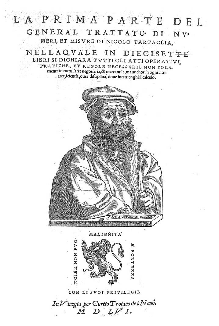 La prima parte del general trattato di numeri, et misure di Nicolo Tartaglia, nella quale in diecisette libri si dichiara tutti gli atti operatiui, pratiche, et regole necessarie non solamente in tutta l'arte negotiaria, & mercantile, ma anchor in ogni altra arte, scientia, ouer disciplina, doue interuenghi il calculo. - In Vinegia : per Curtio Troiano de i Nauò, 1556. - [6], 277, [1] c. : ill. .